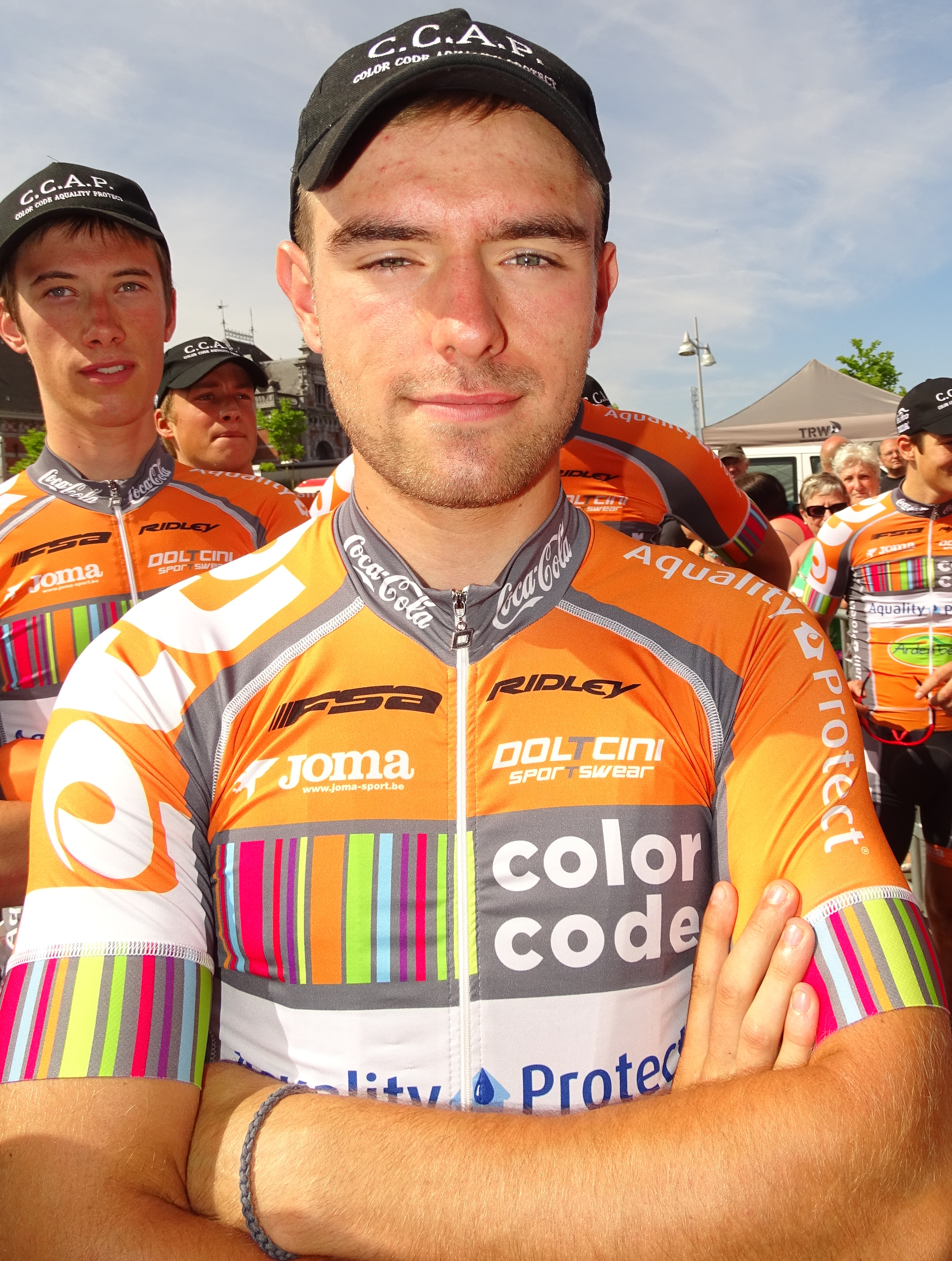 Reportage réalisé le mercredi 22 juillet à l'occasion du départ du Grand Prix Pino Cerami 2015 à Saint-Ghislain, Belgique.